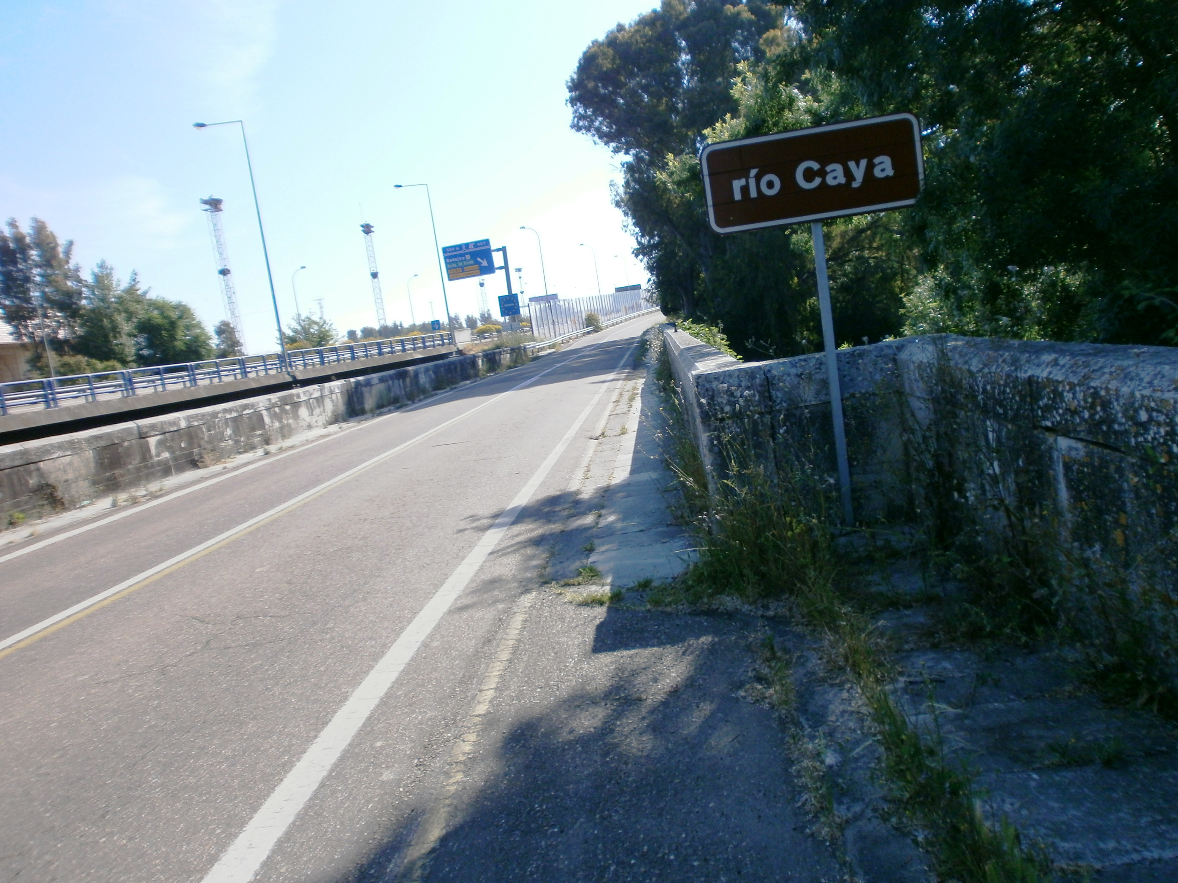 Río Caya en la frontera de España y Portugal